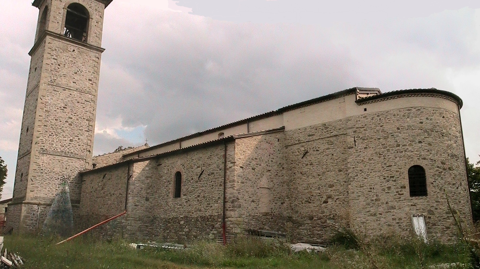 Bazzano (Neviano degli Arduini) - Pieve romanica di Sant'Ambrogio